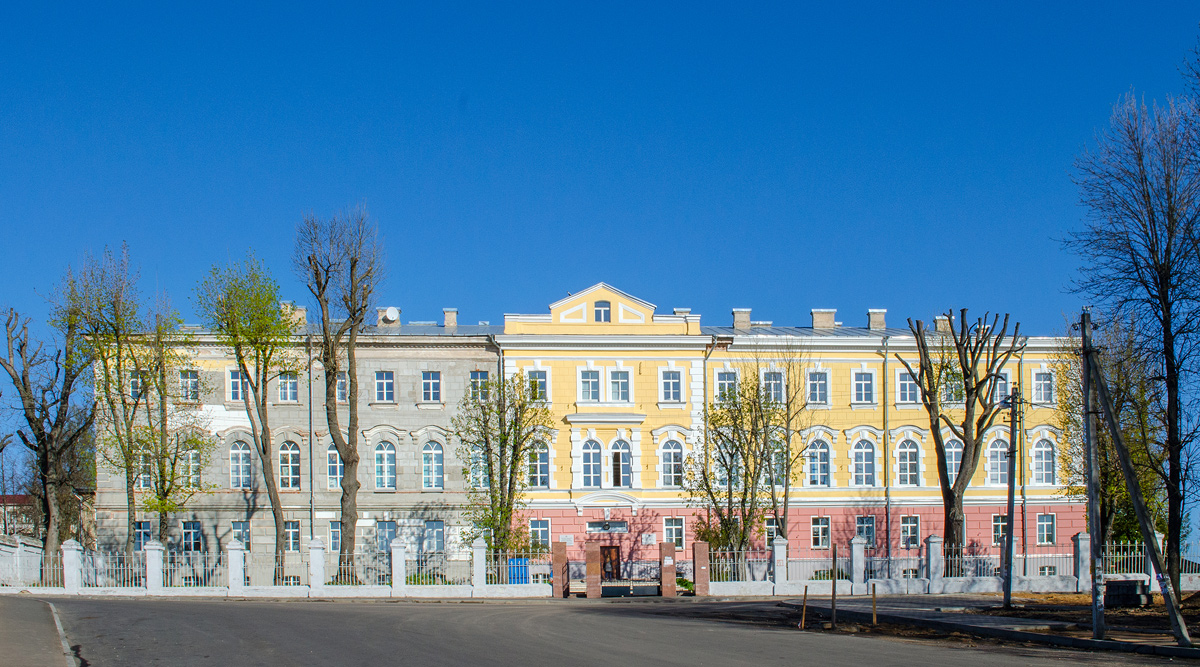 Магілёў. Вуліца Зладзейскага, 29